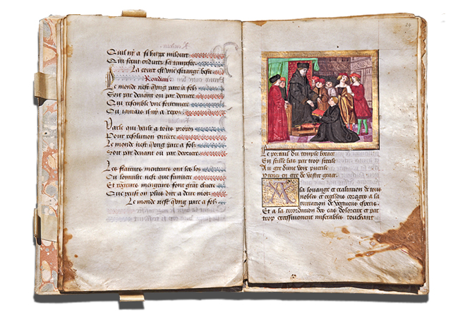 Antitus offrant son poème à l'évêque de Lausanne, Aymon de Montfalcon